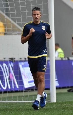 Robin van Persie, 5 Ağustos 2015 tarihindeki Şahtar Donetsk karşılaşması öncesinde Fenerbahçe formasıyla antrenman yaparken.